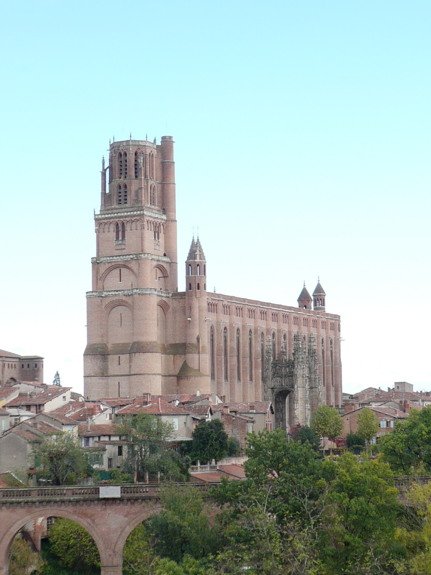 Cathédrale Sainte Cécile d'Albi